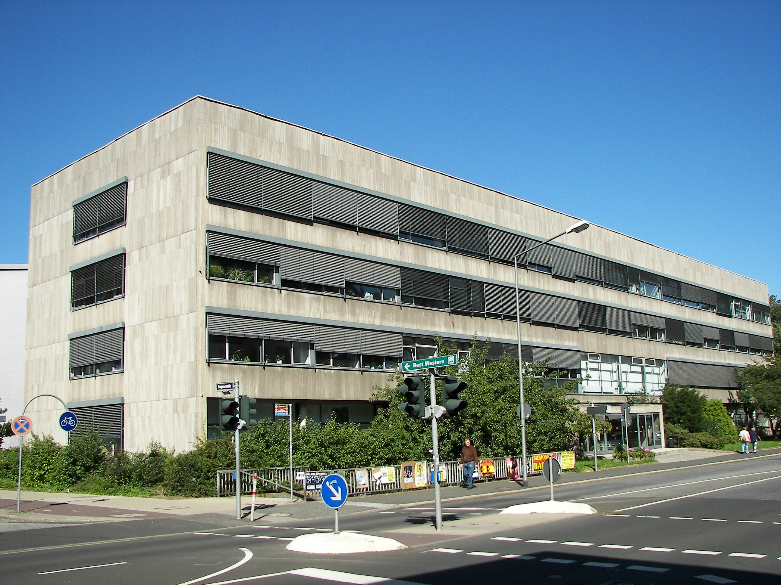 Universität Marburg, Verwaltungsgebäude in der Biegenstraße.